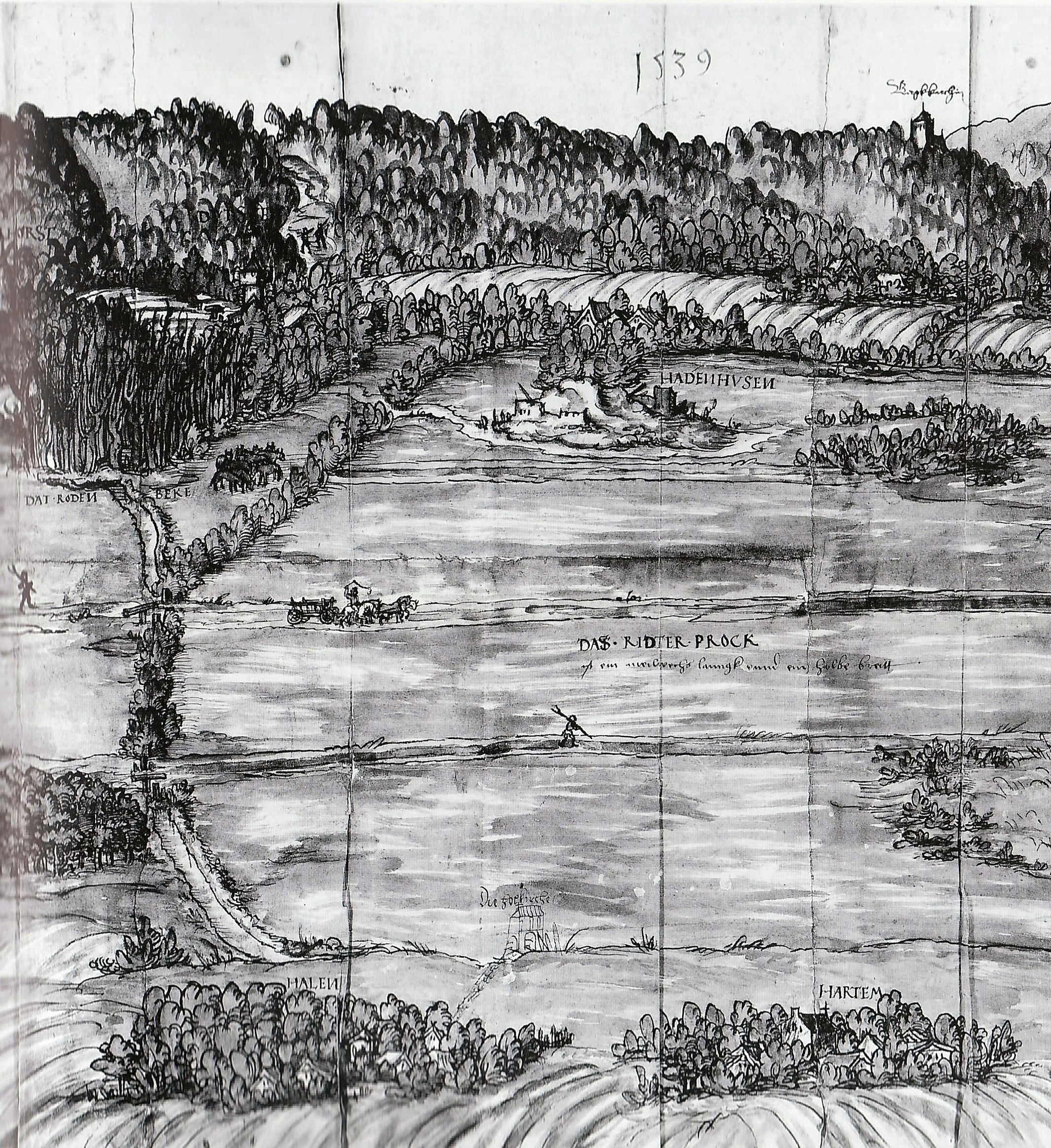 Ansicht des Ritterbruches bei Minden von 1539 mit der ältesten bildlichen Darstellung Hahlens (unten links)